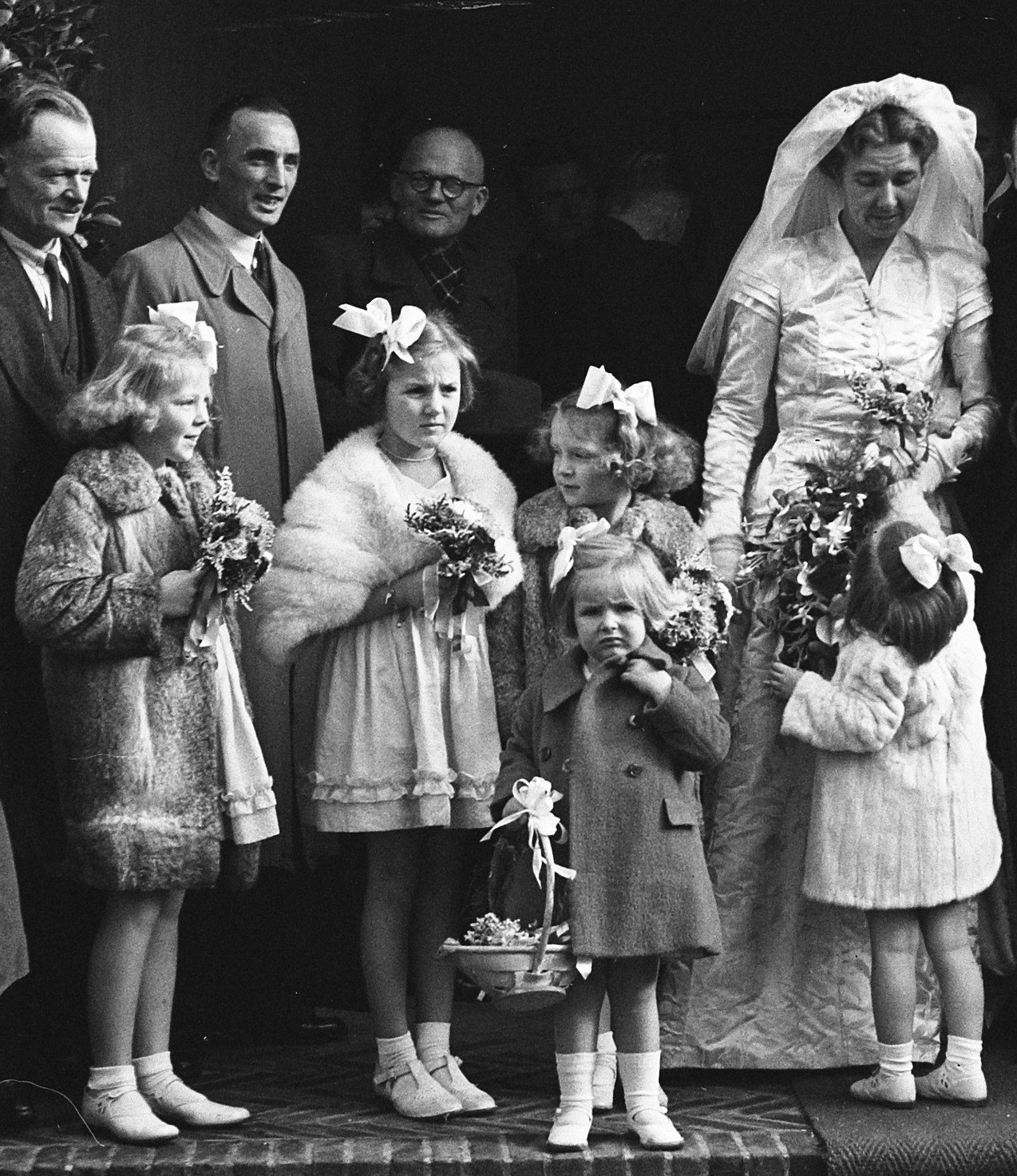 Huwelijk jhr. ir. Joan Röell en jkvr. Sophia Christina Feith, waarbij de prinsessen Beatrix en Irene samen met Reneé Röell bruidsmeisjes zijn, en prinses Margriet bloemenmeisje. Het huwelijk werd voltrokken in Hilversum